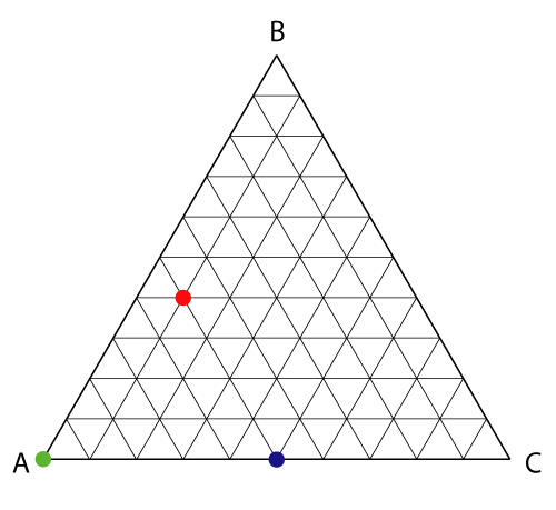 Kolmnurkdiagramm kolme analüüsi tulemustega